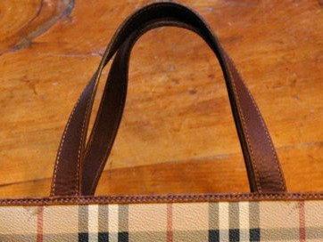 gemaakt van foto handtas (afbeelding bij Tas). Martink.